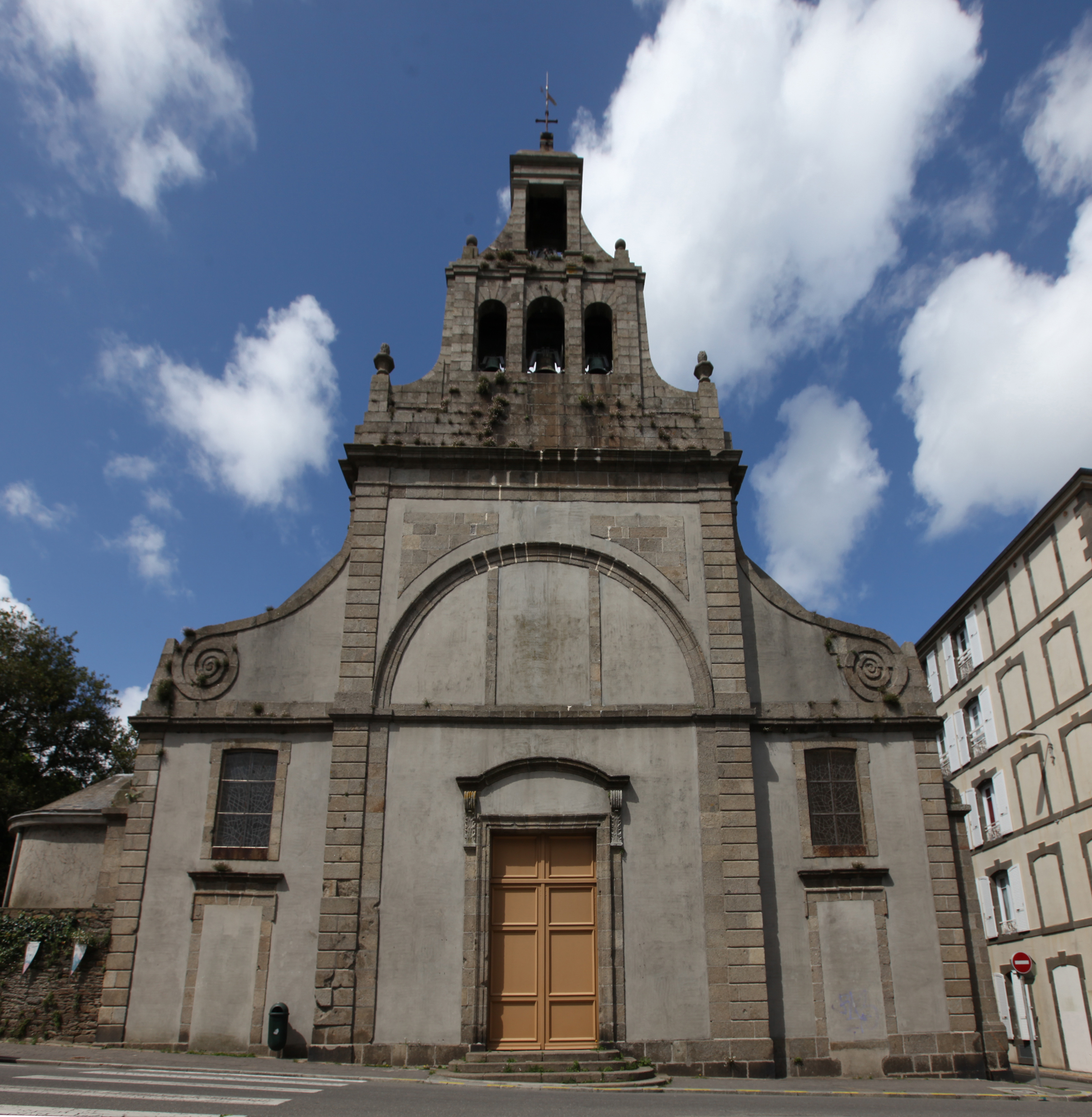 Façade de l'église Saint-Sauveur de Recouvrance à Brest (France)